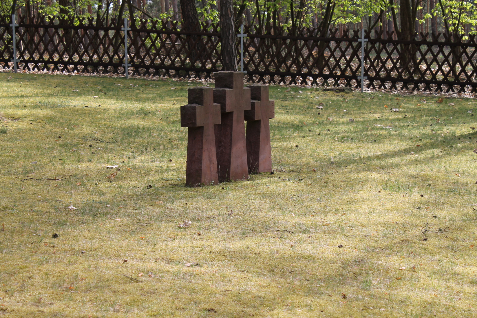 Dreier Steinkreuzgruppe auf dem Waldfriedhof Halbe